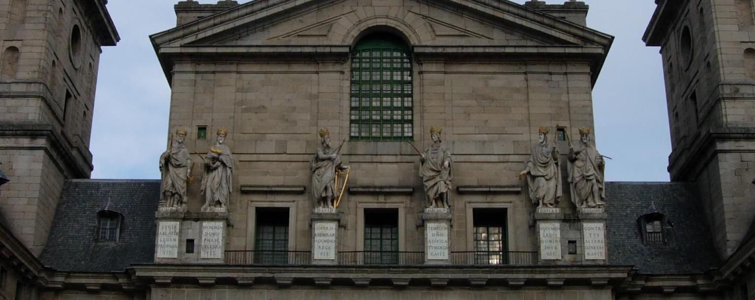 Estatuas de los Reyes de Judá en el monasterio de El Escorial